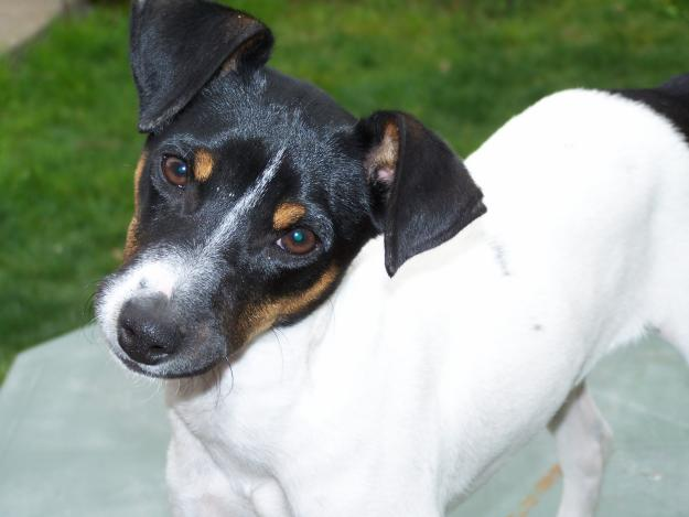 bodeguero ratonero andaluz